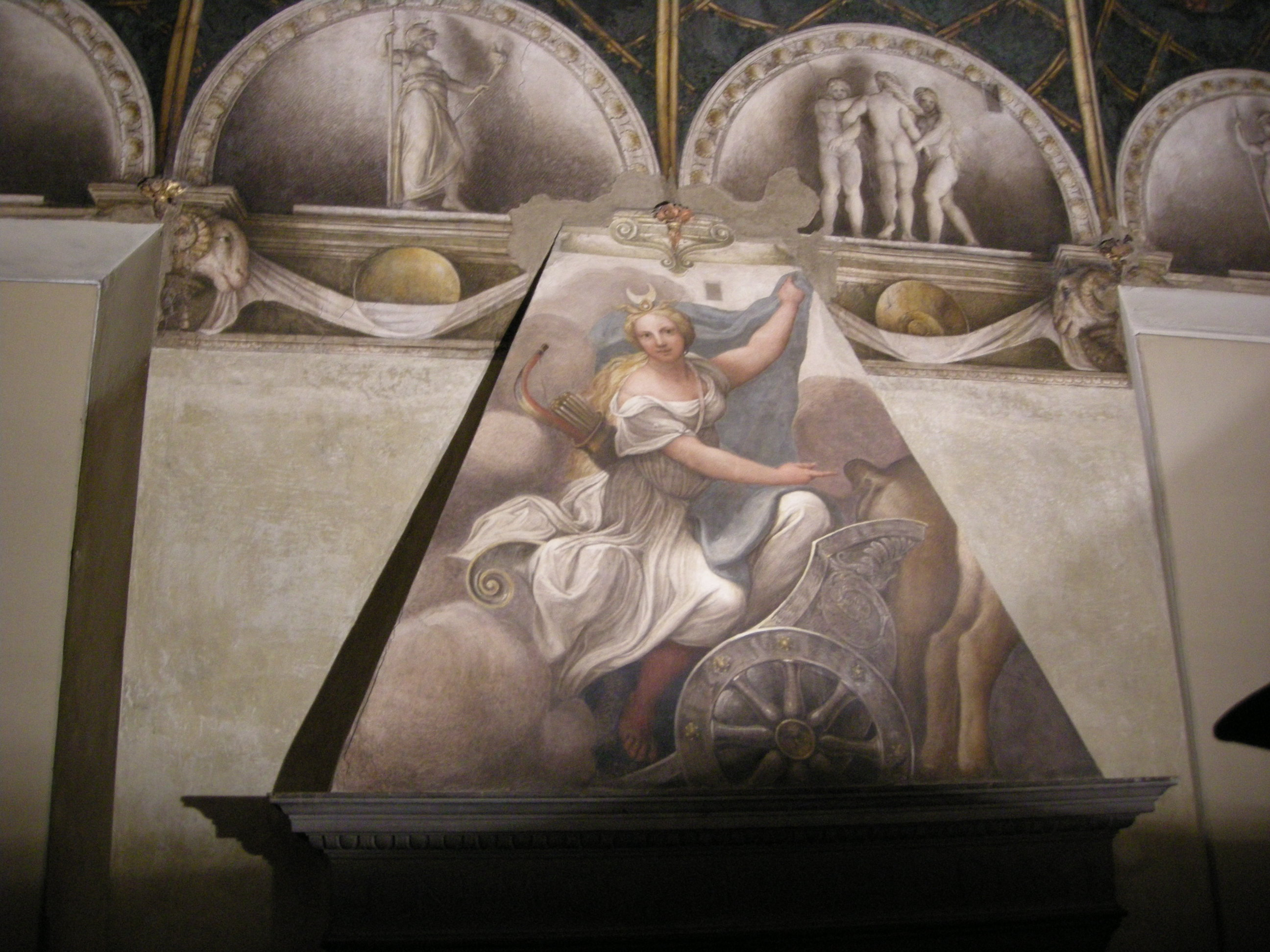 Camera della badessa